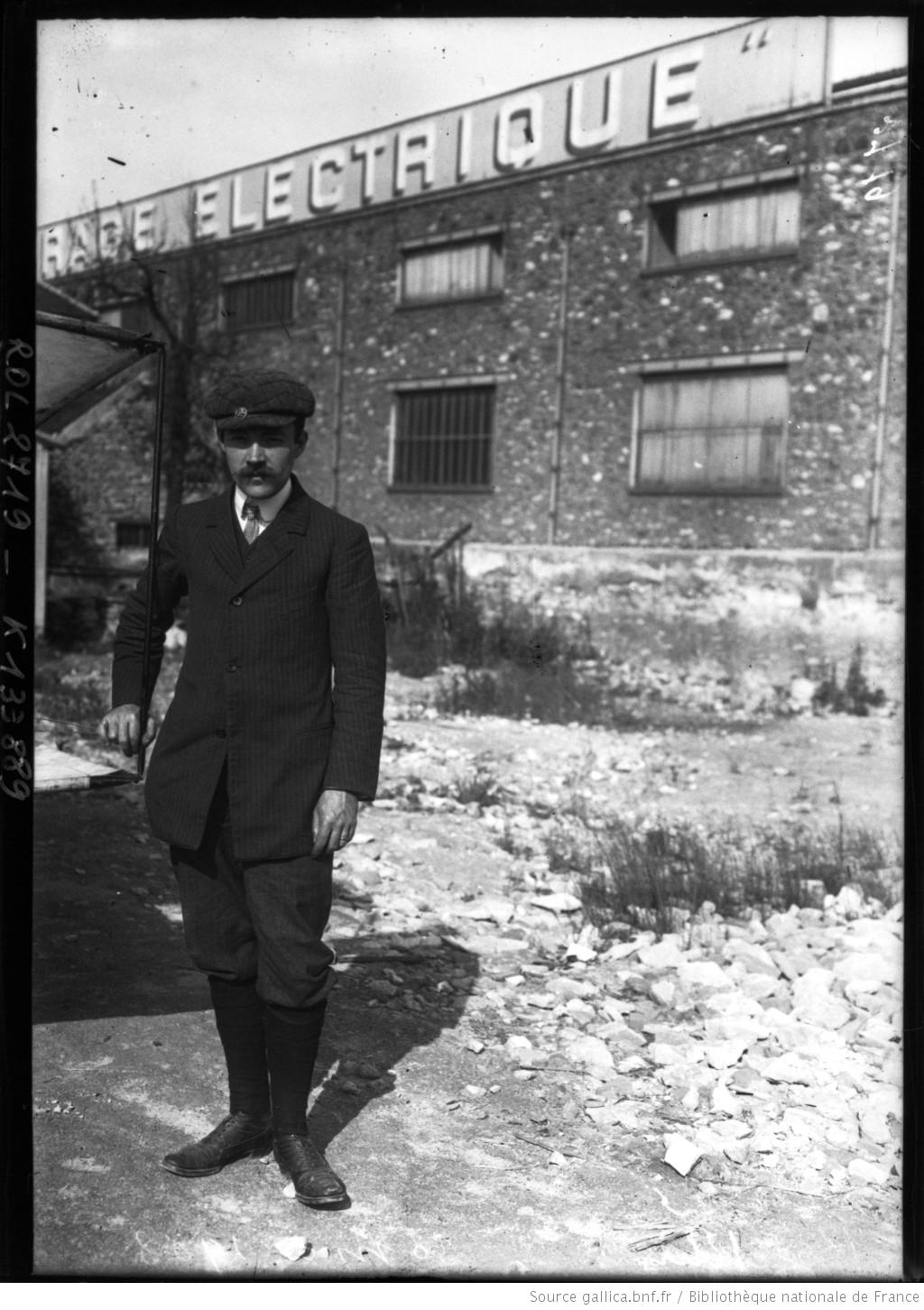 Paul Koechlin, 30 mai 1908 : photographie de presse / [Agence Rol]